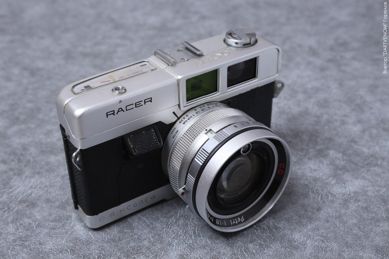 Дальномерная фотокамера Petri Racer